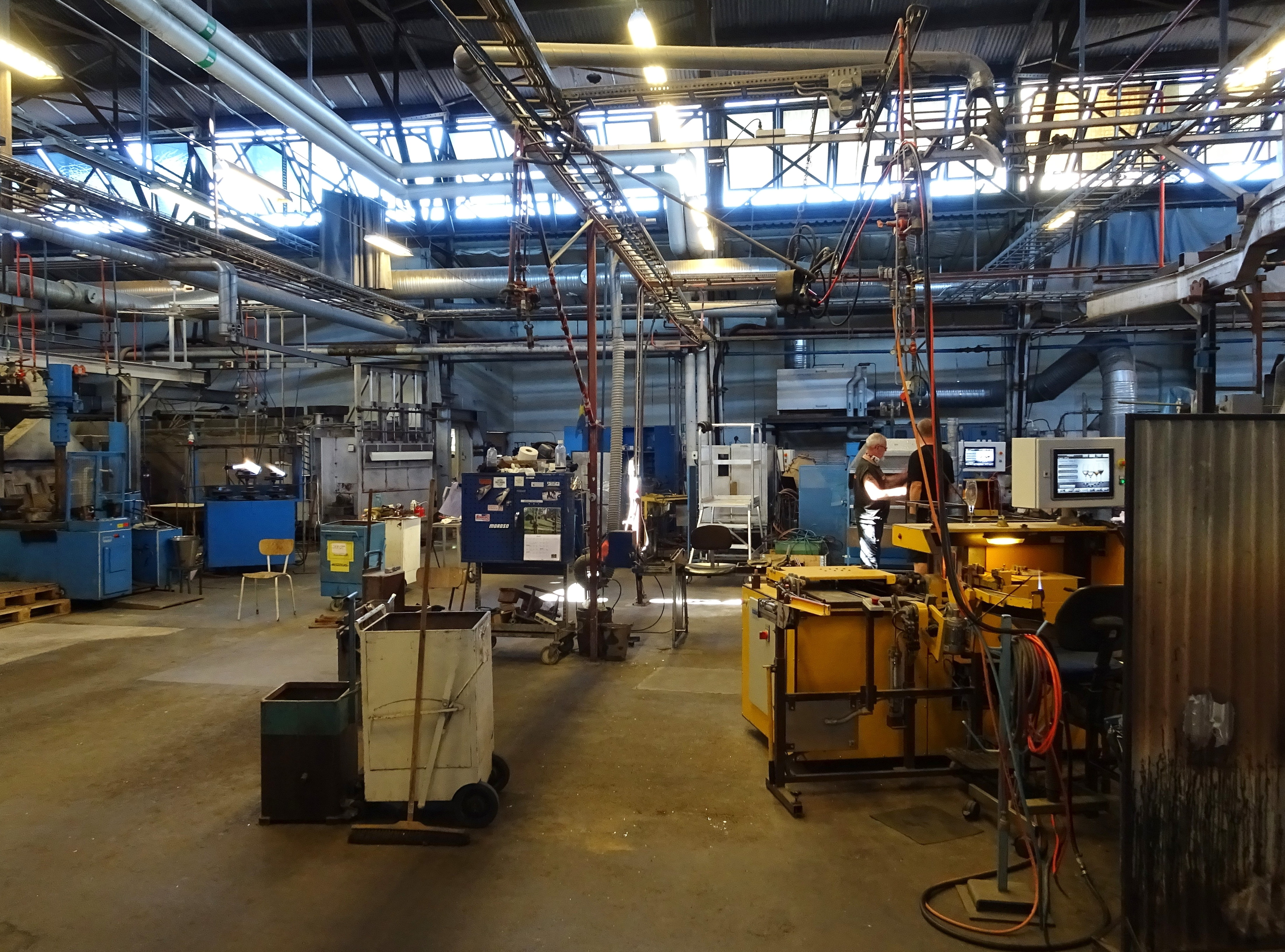 Kosta fabriken